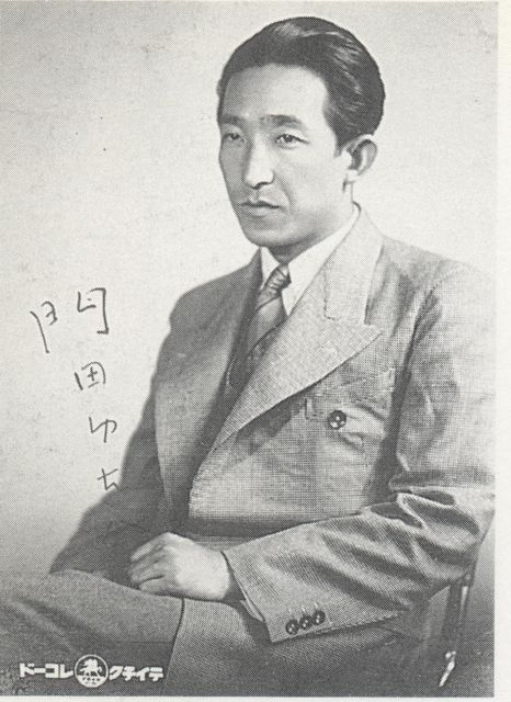 1930年代のブロマイドをスキャン